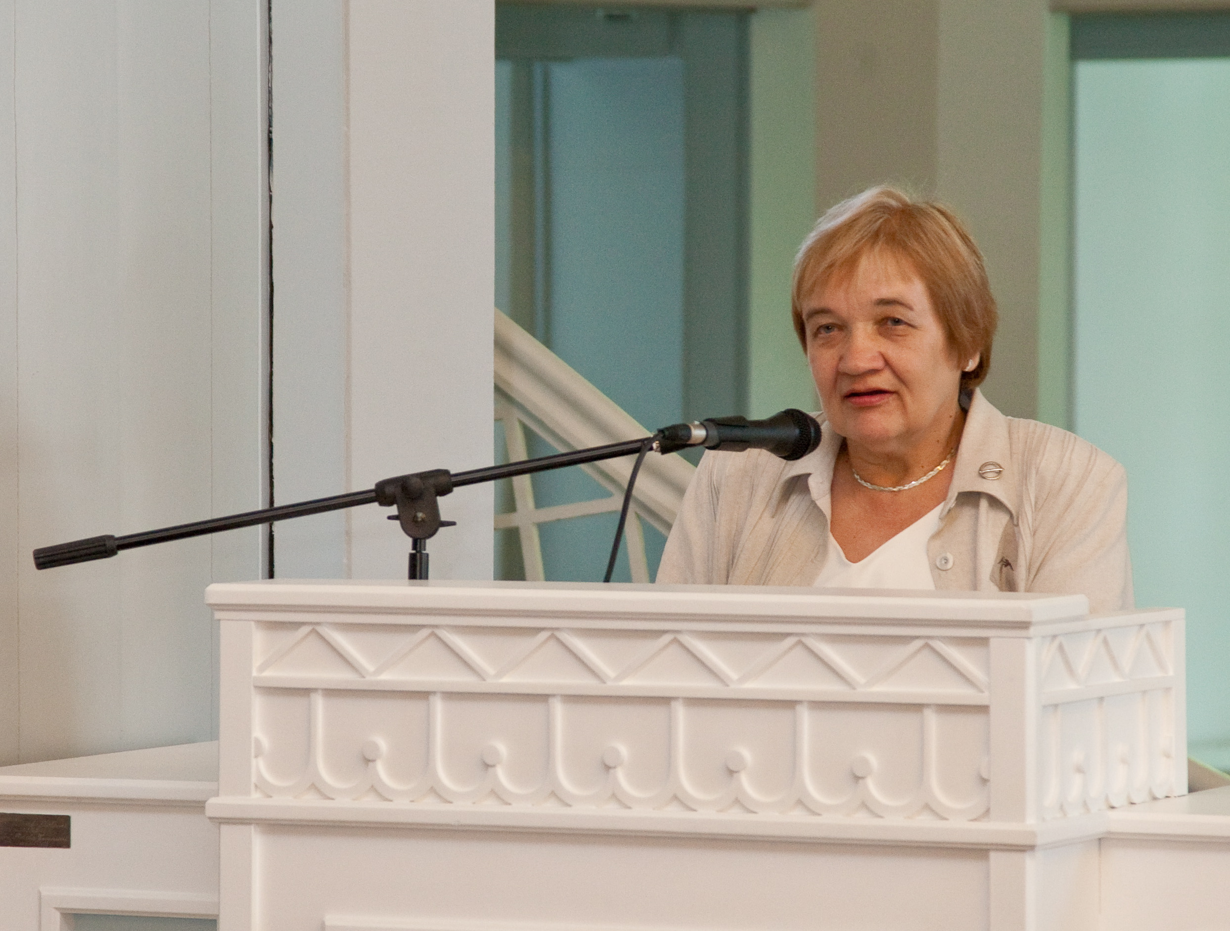 Tartu Ülikooli eesti ja üldkeeleteaduse instituudi bakalaureuseõppe lõpuaktus TÜ ajaloo muuseumi valges saalis 28. juunil 2010. Pildil instituudi juhataja prof Helle Metslang.